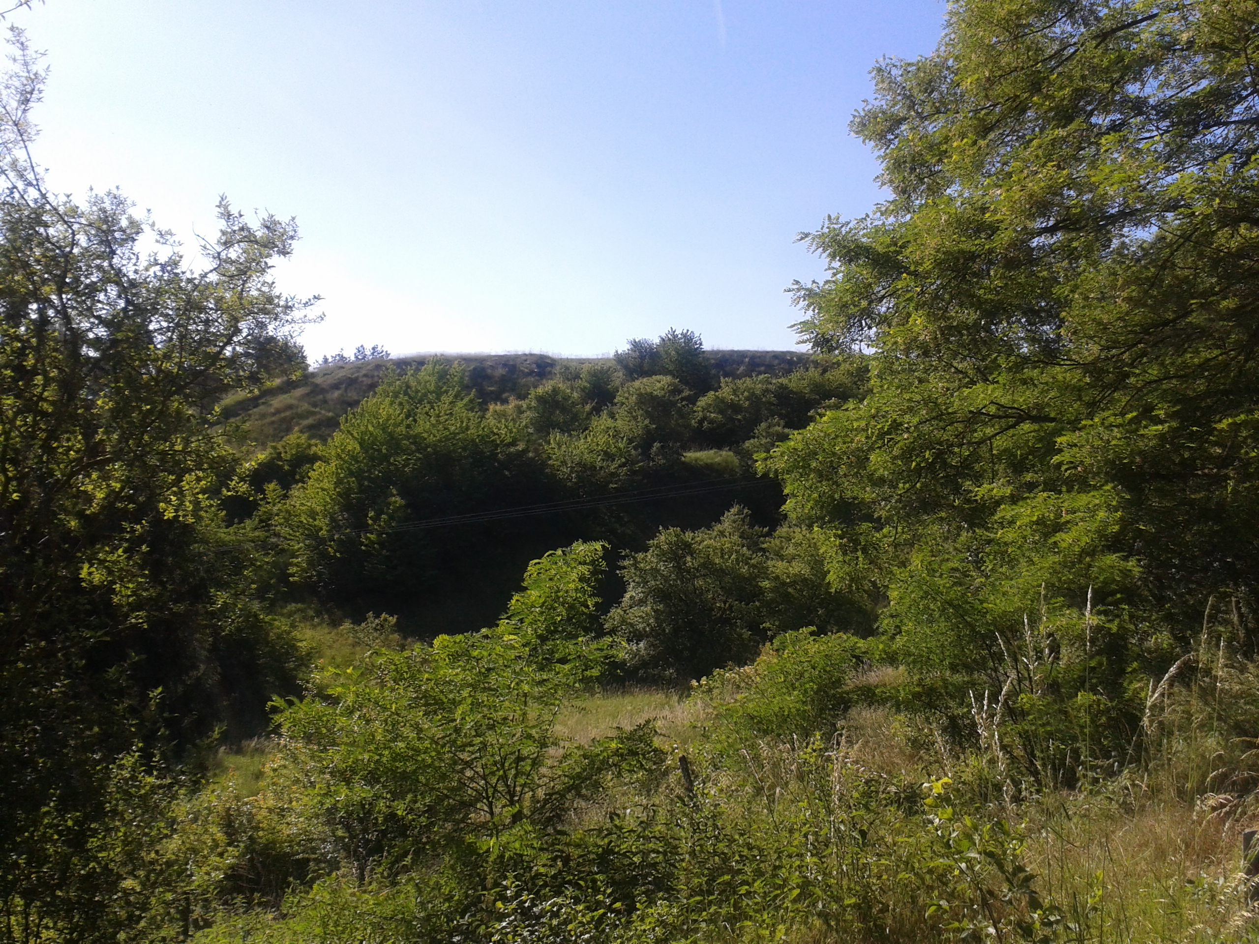 Hradisko Zelená Hora